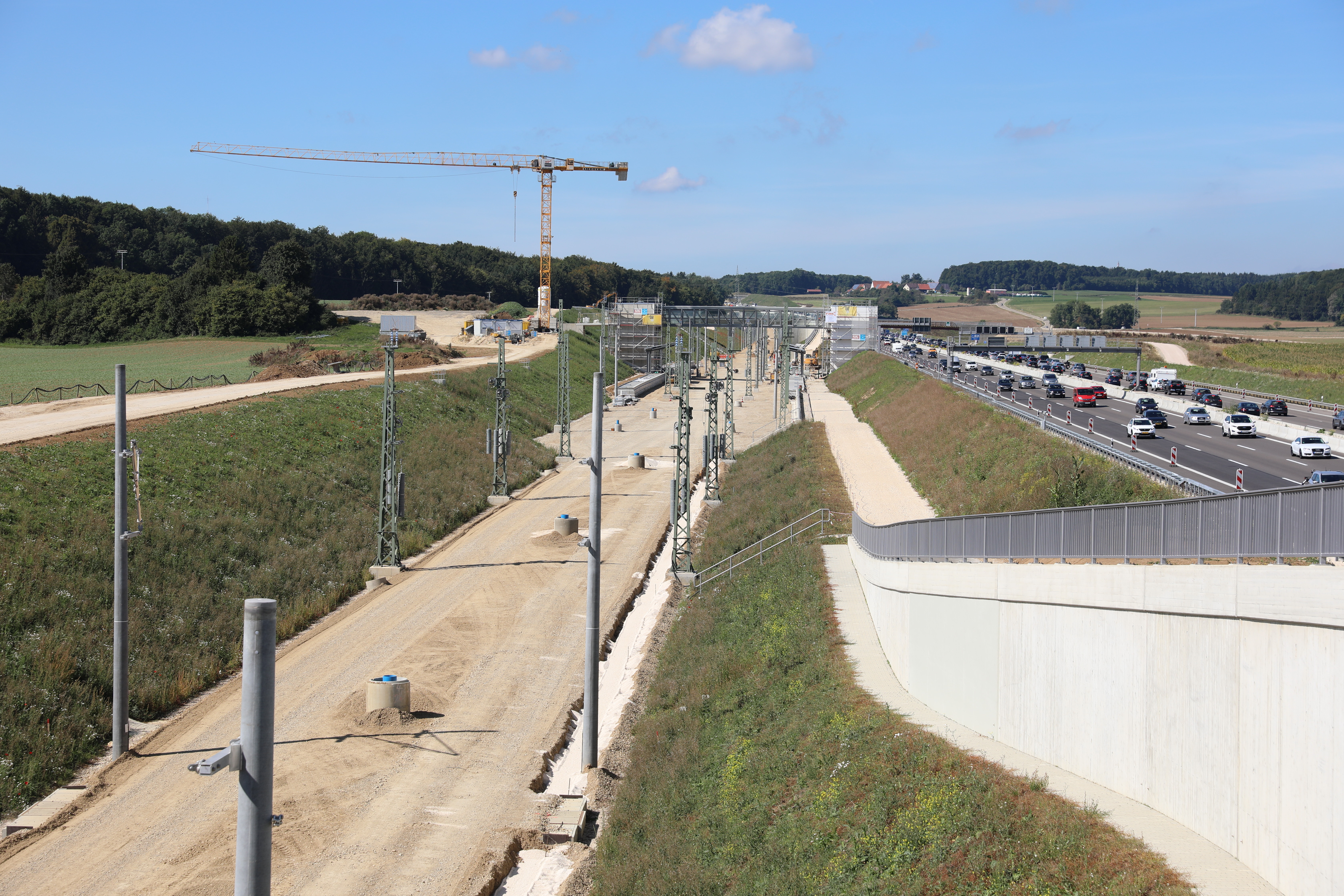 Blick von Osten auf den im Bau befindlichen Bahnhof Merklingen